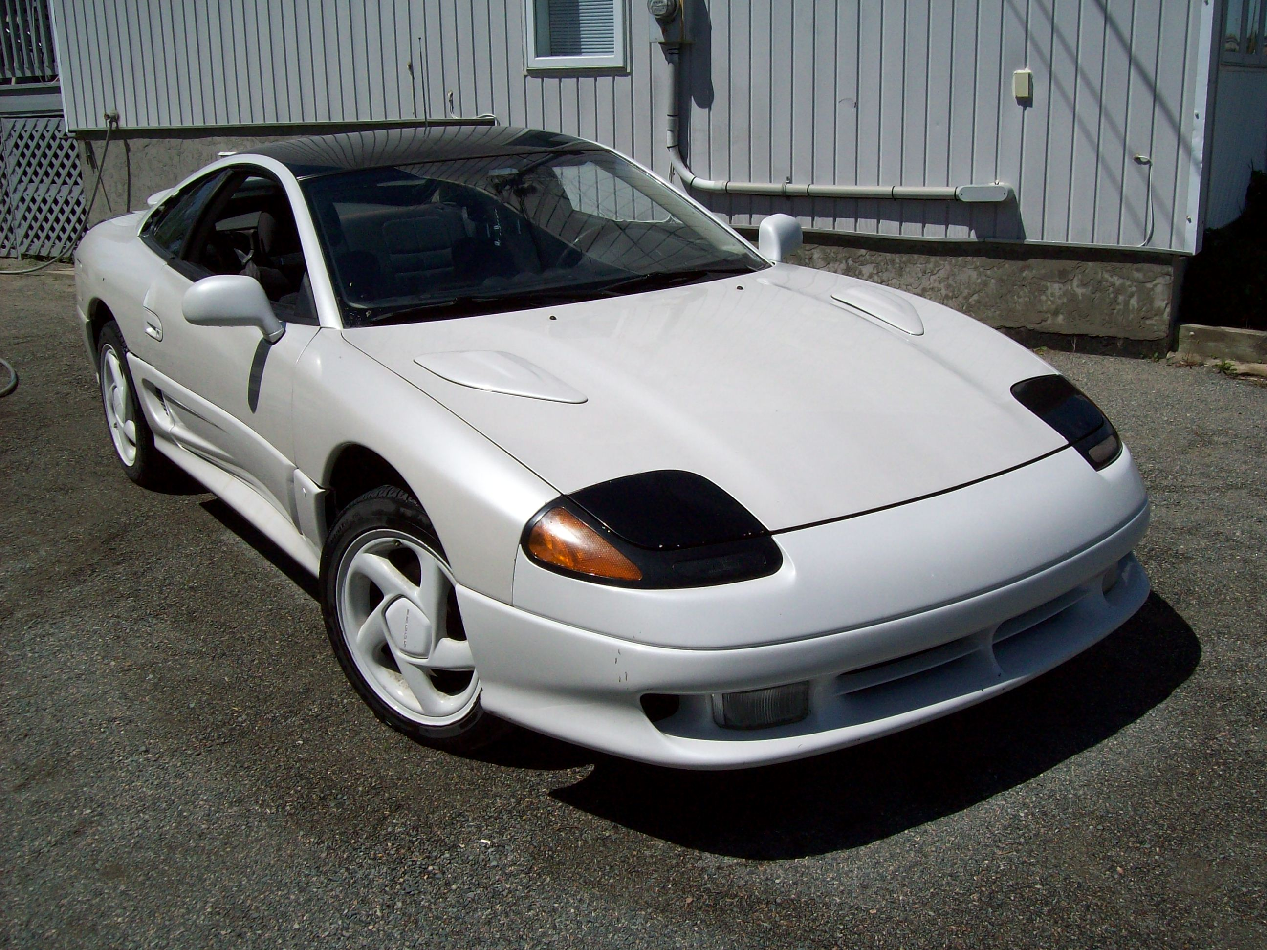 Mon Dodge Stealth RT 1991. 200 000Km